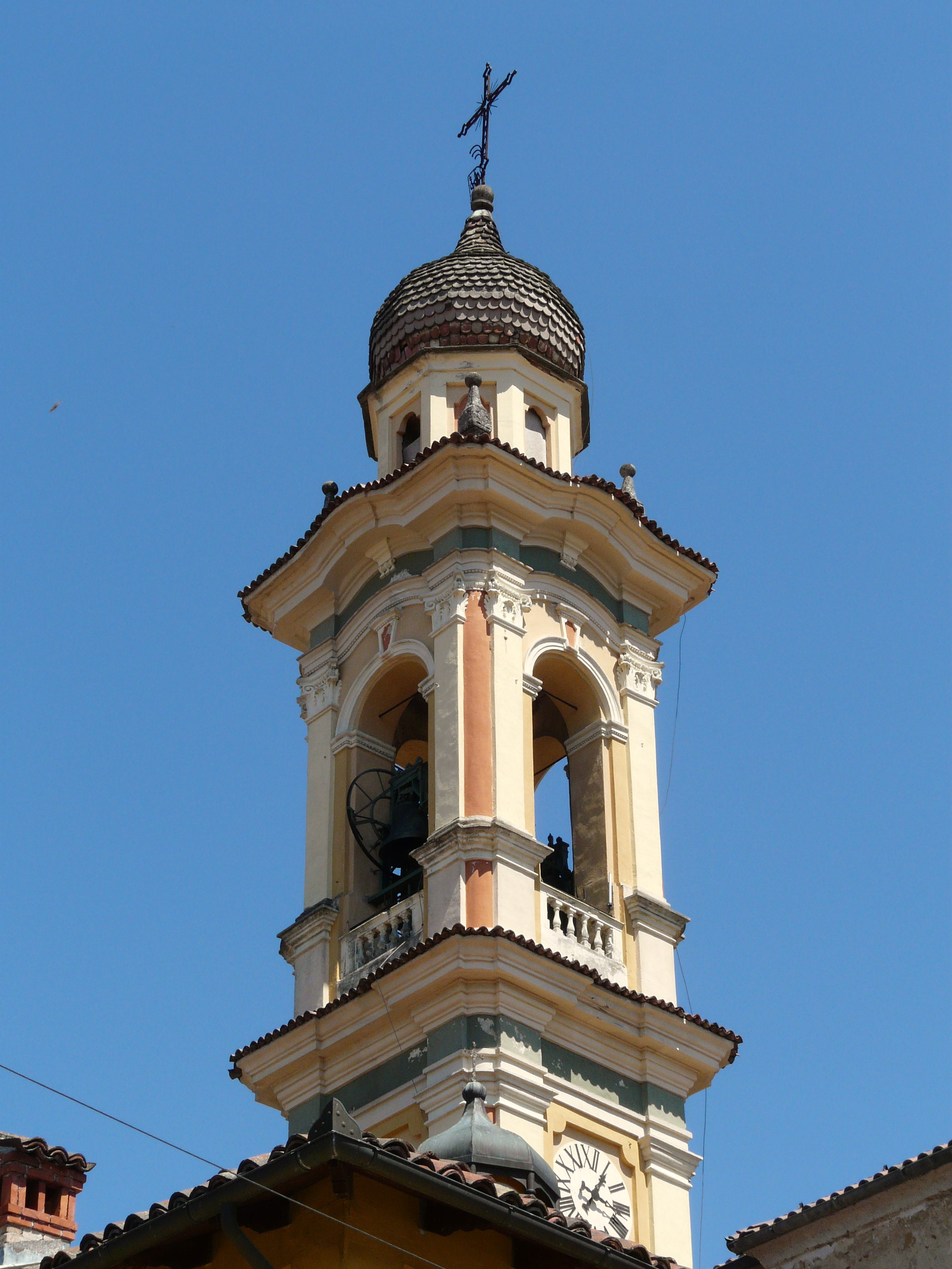 Campanile della chiesa di San Vittore, Borghetto di Borbera, Piemonte, Italia